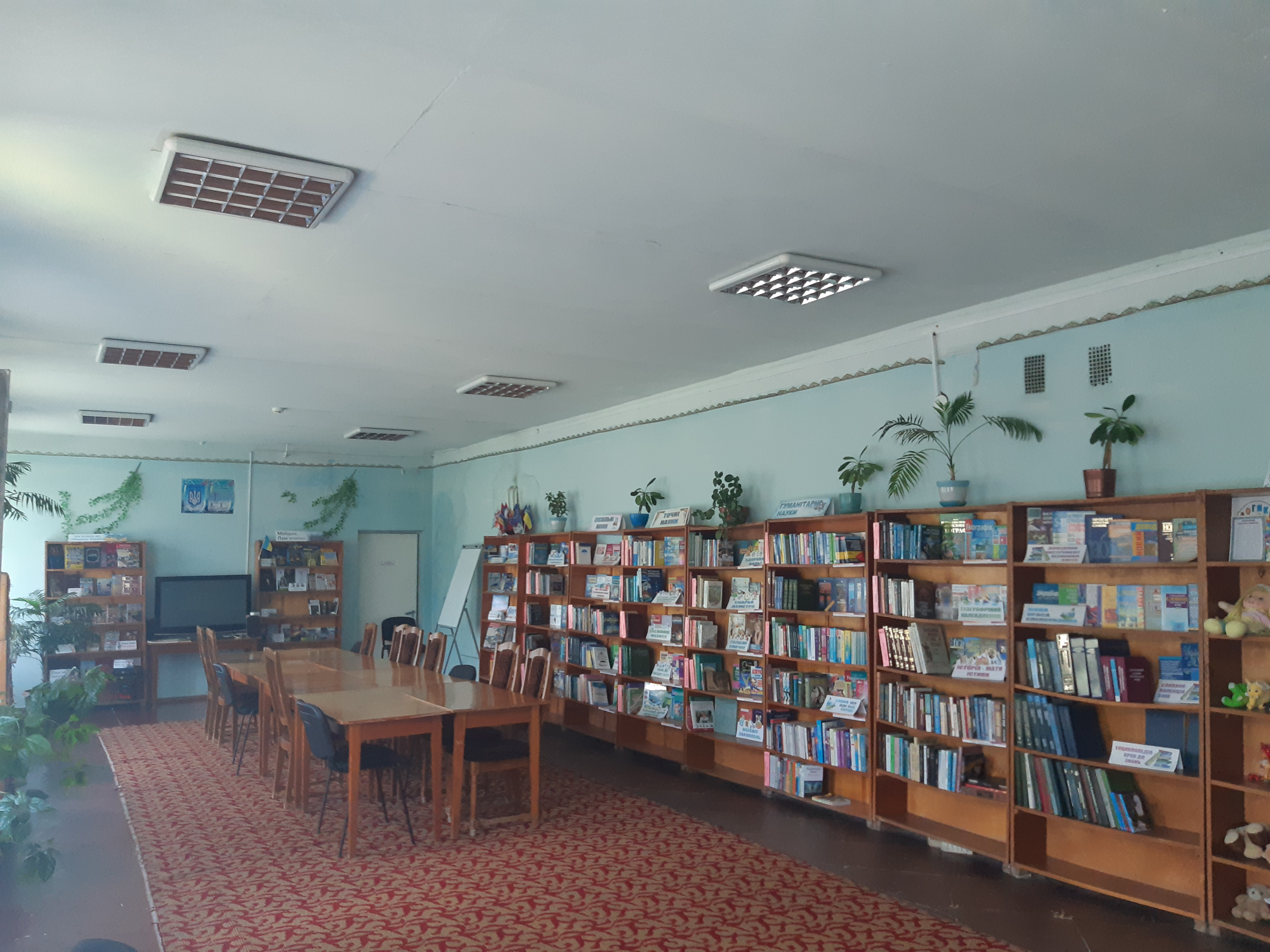 Читальний зал Хмельницької міської бібліотеки-філії №11 представлений великою кількістю довідкової літератури із різних галузей знань.